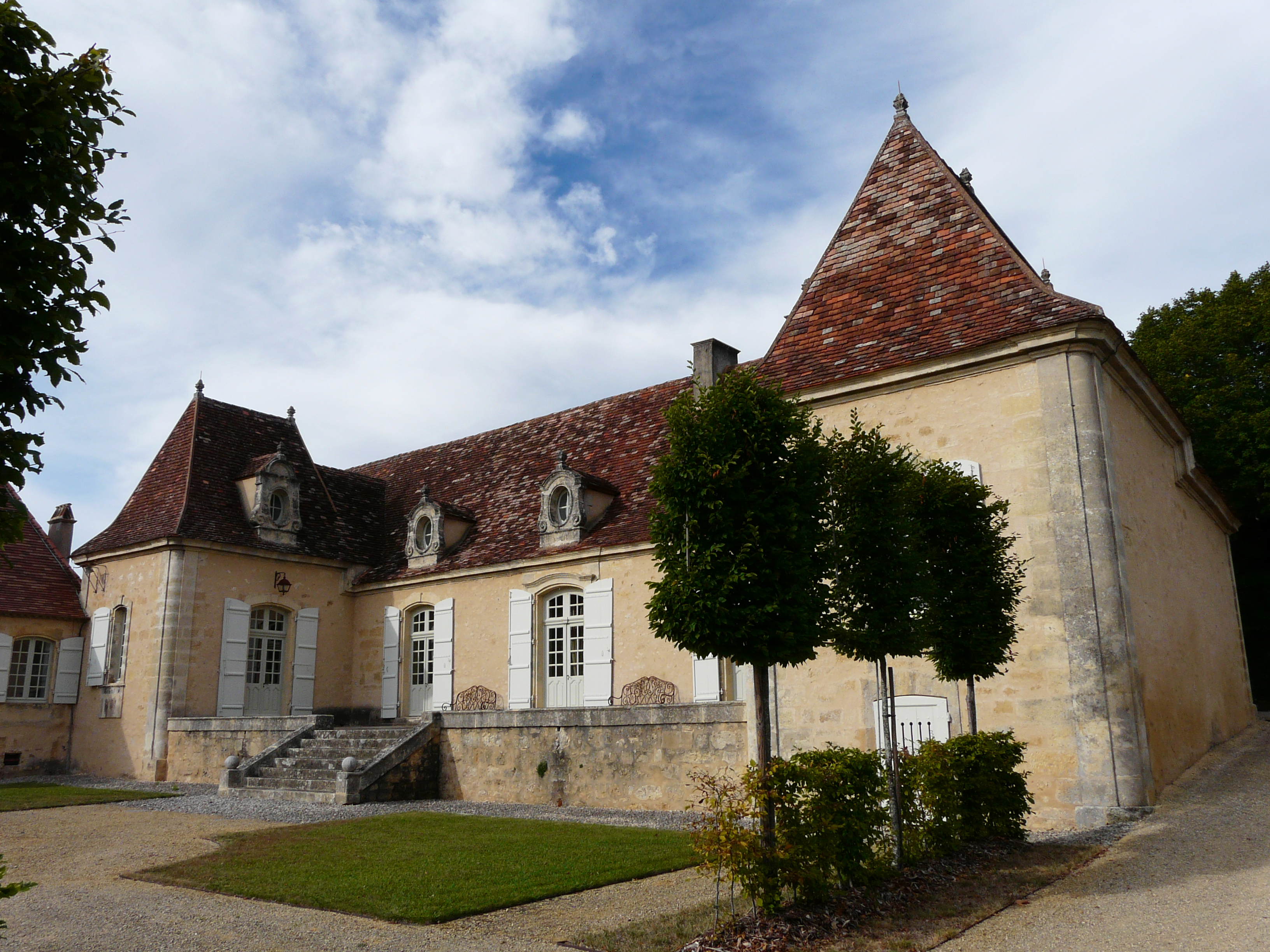 La façade sud-ouest du manoir de Sautet, Molères, Dordogne, France.